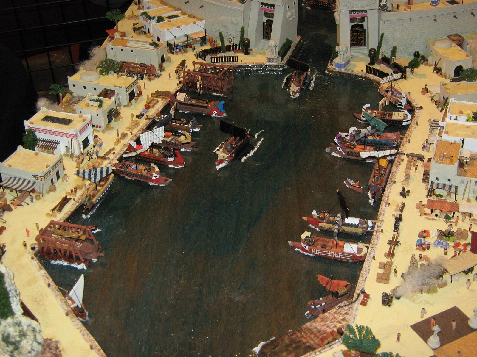 Stand "architecture et histoire" bei der "Expo Trains Modelisme" in Ciney Pierre de Guennec beschreibt sein Diorama des Hafens von Karthago: Nous somes entre 260 et 220 a.v. Jésus-Christ, sous le règne d'HAMILCAR BARCA durant la première guerre punique. La maquette représente le fabuleus port de CARTHAGE, alors que la ville archande domine sur le cvommerce Méditéranéen, de la Sicile, à l'est de la péninsule hibérique et sur toute l'Afrique du Nord. En 146 a.v. J.C. la ville sera entièrement resée par l'armée Romaine, et reconstruite en 29 a.v. J.C., mais à la romaine.